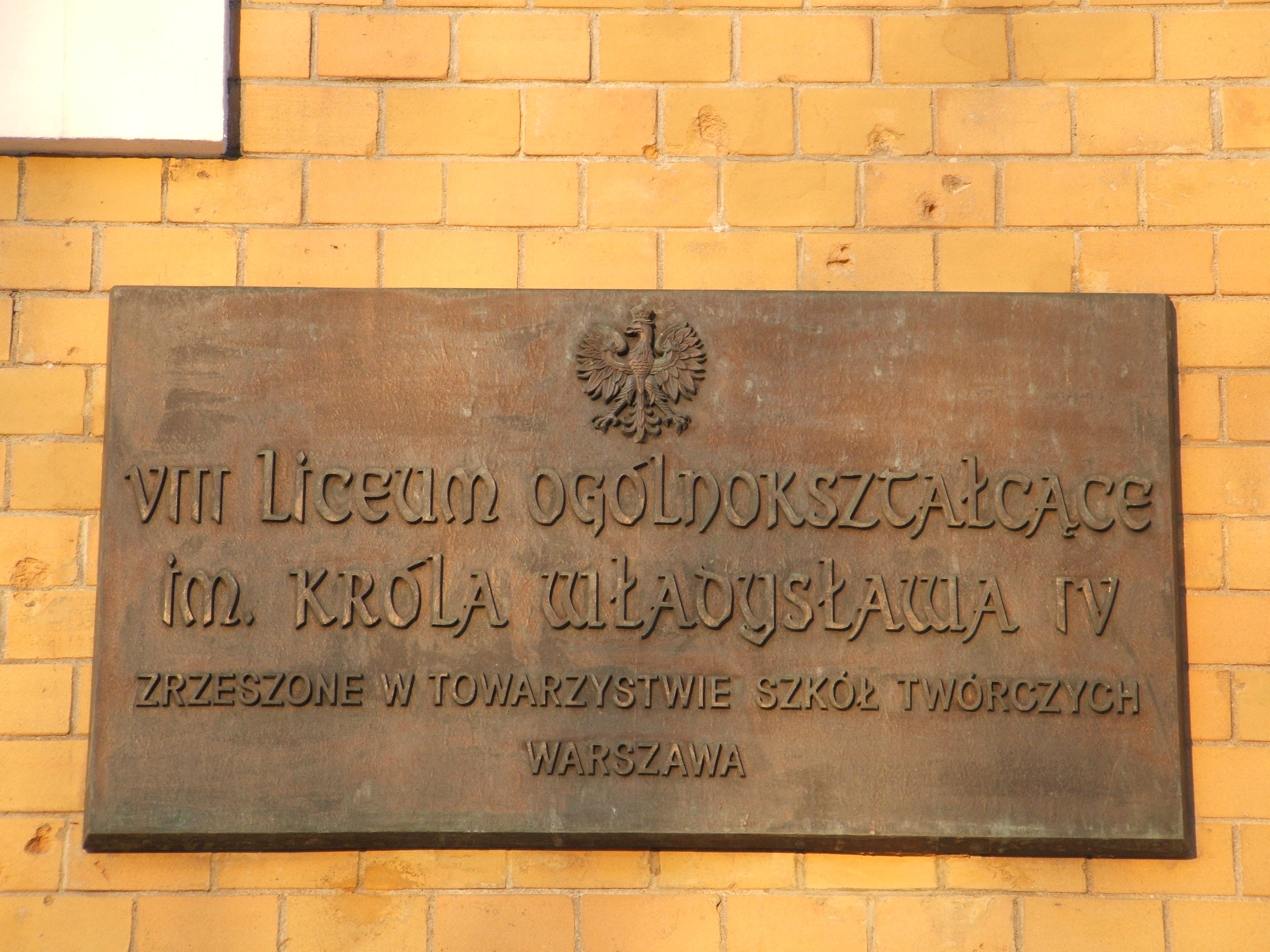 Tablica na budynku VIII LO od strony ul. Jagiellońskiej